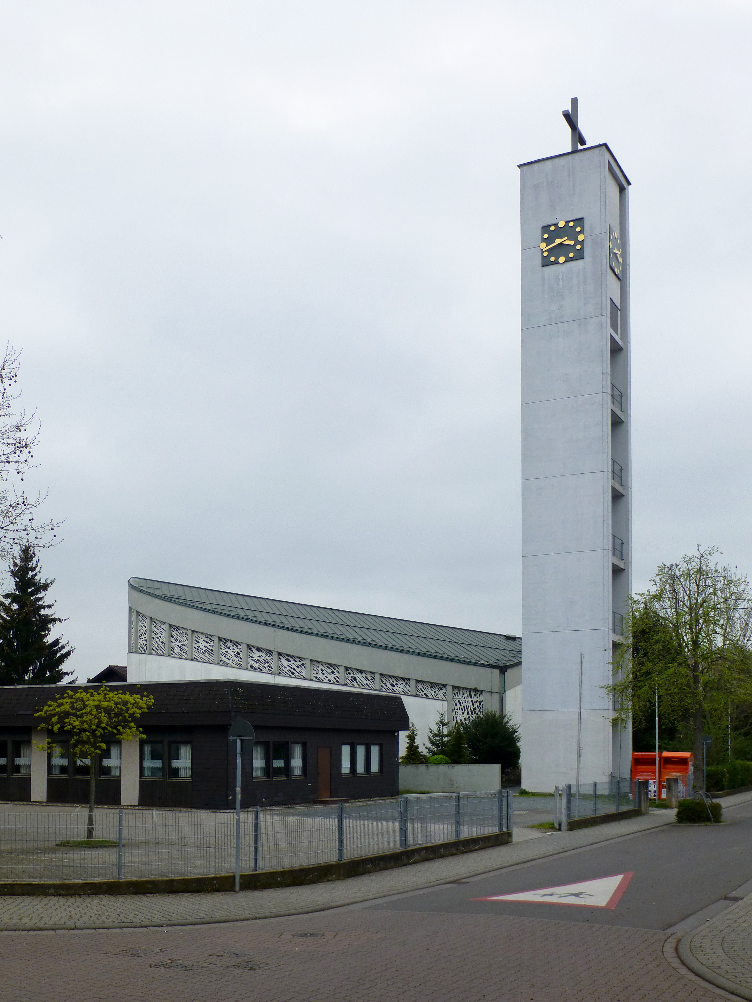 Katholische Pfarrkirche St. Laurentius in Bensheim; Ansicht von Südosten